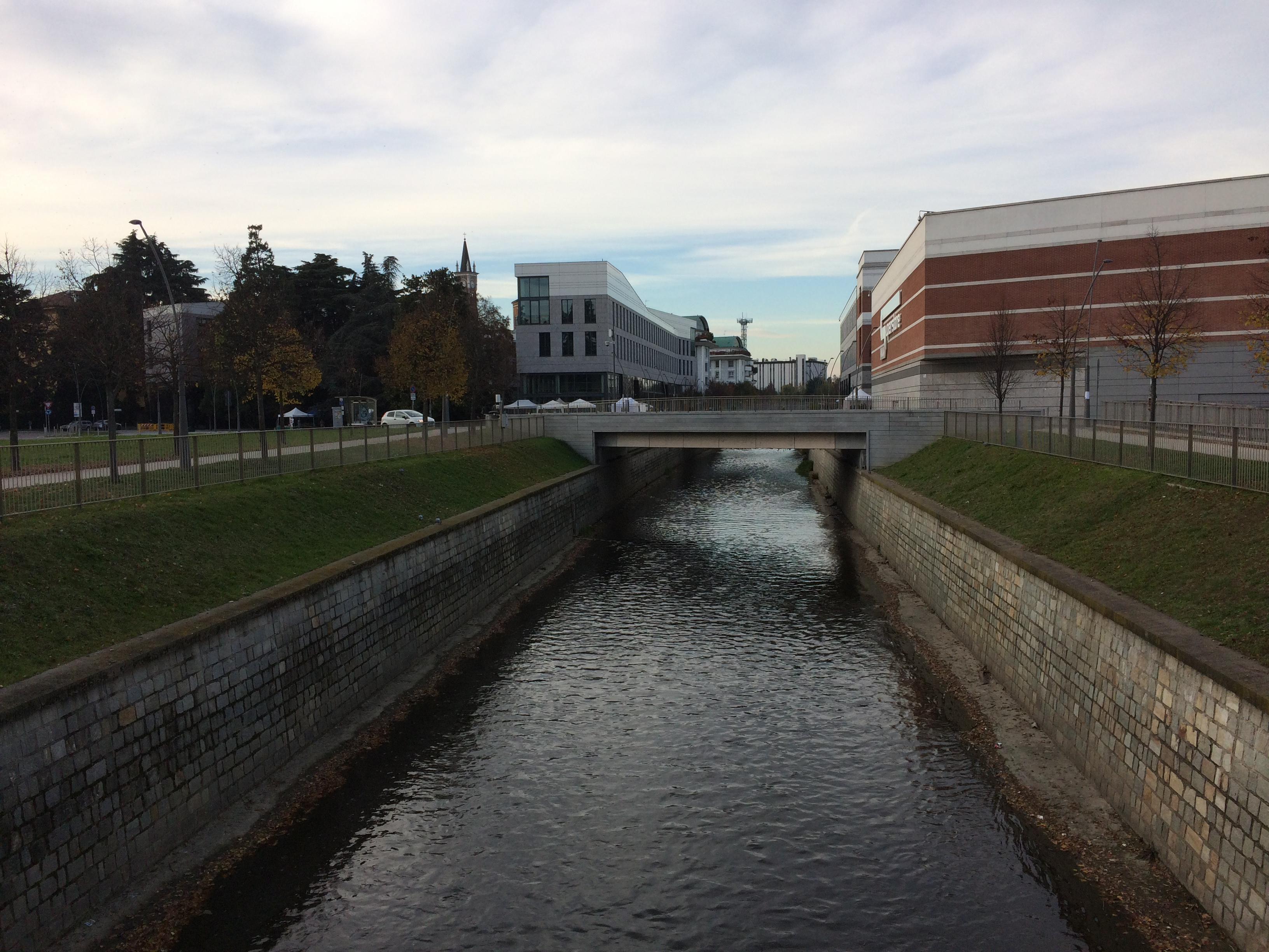 Il fiume Olona a Legnano presso il centro commerciale "Gallerie Cantoni"